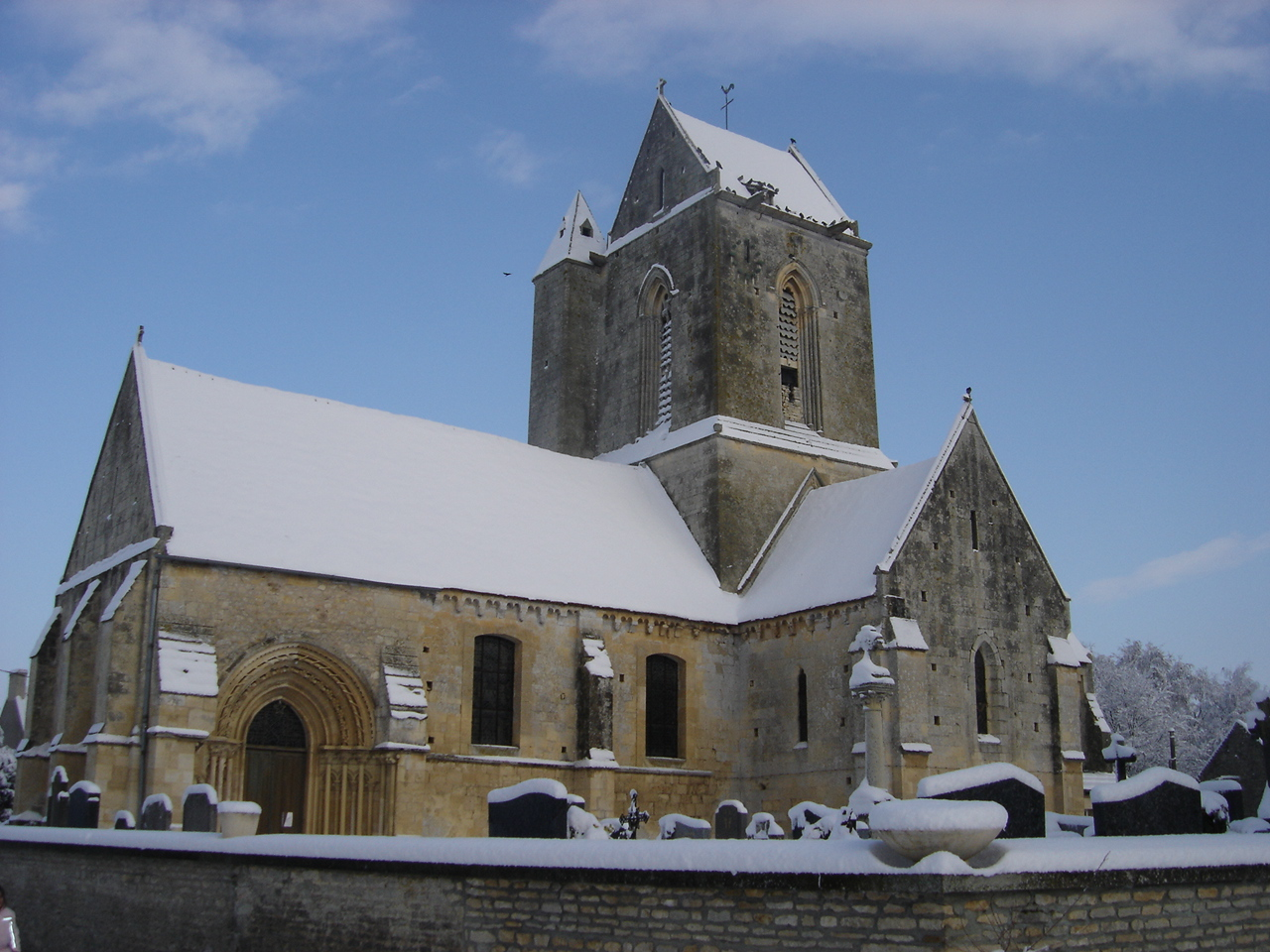 Photographie Eglise Condé Hiver Neige